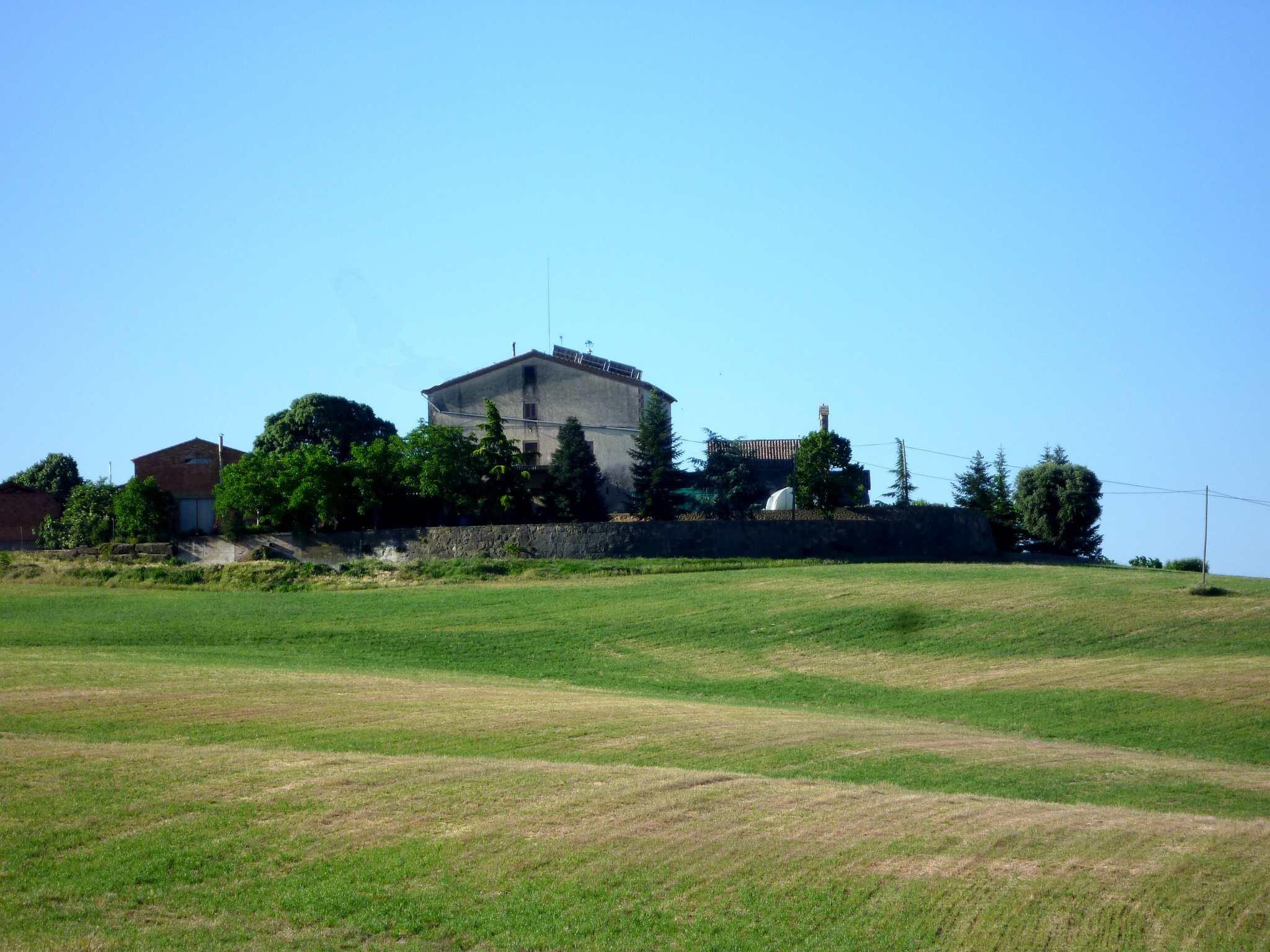 Mas Fígols (Montmajor): conjunt amb la capella